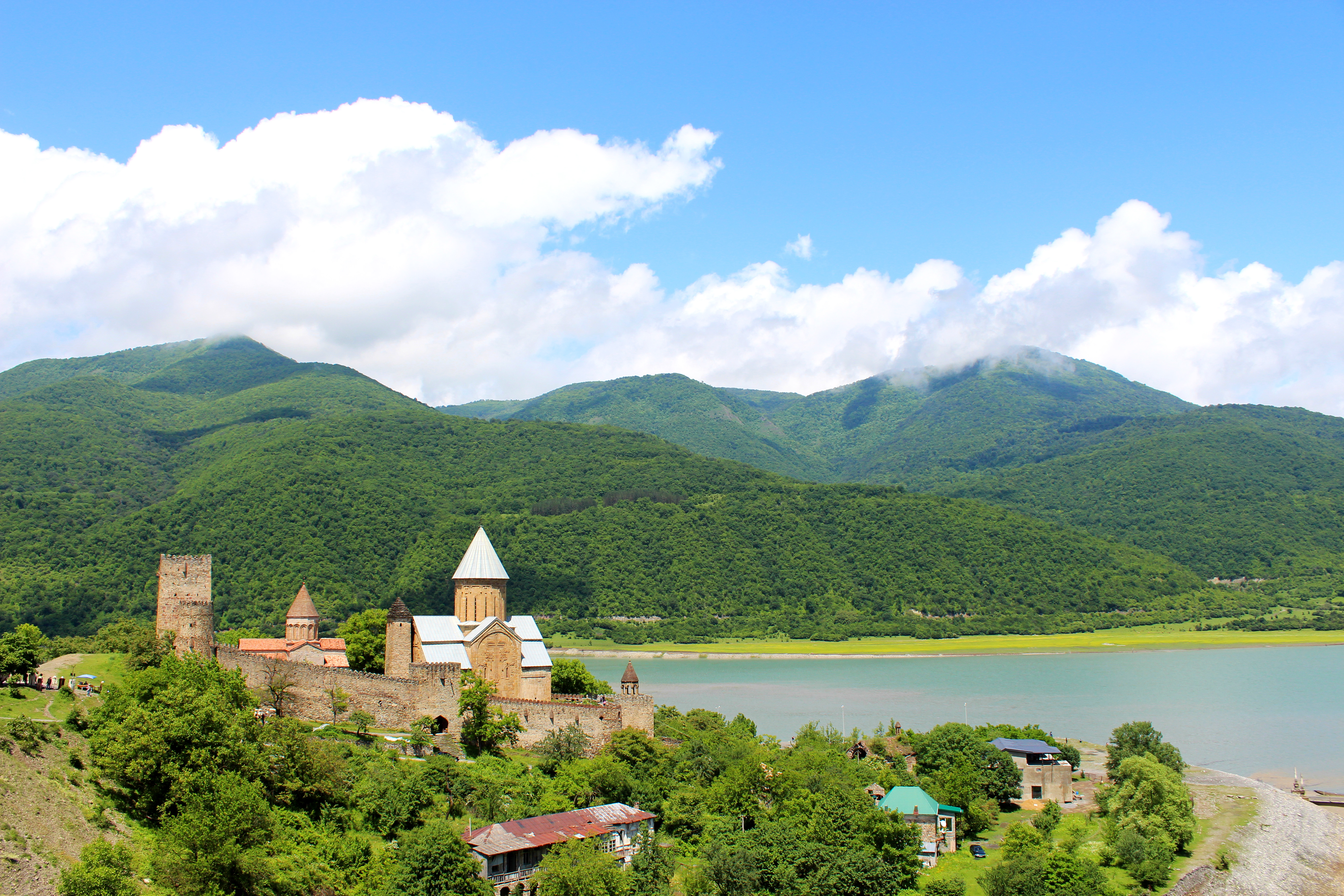 სხვა ნაგებობანი